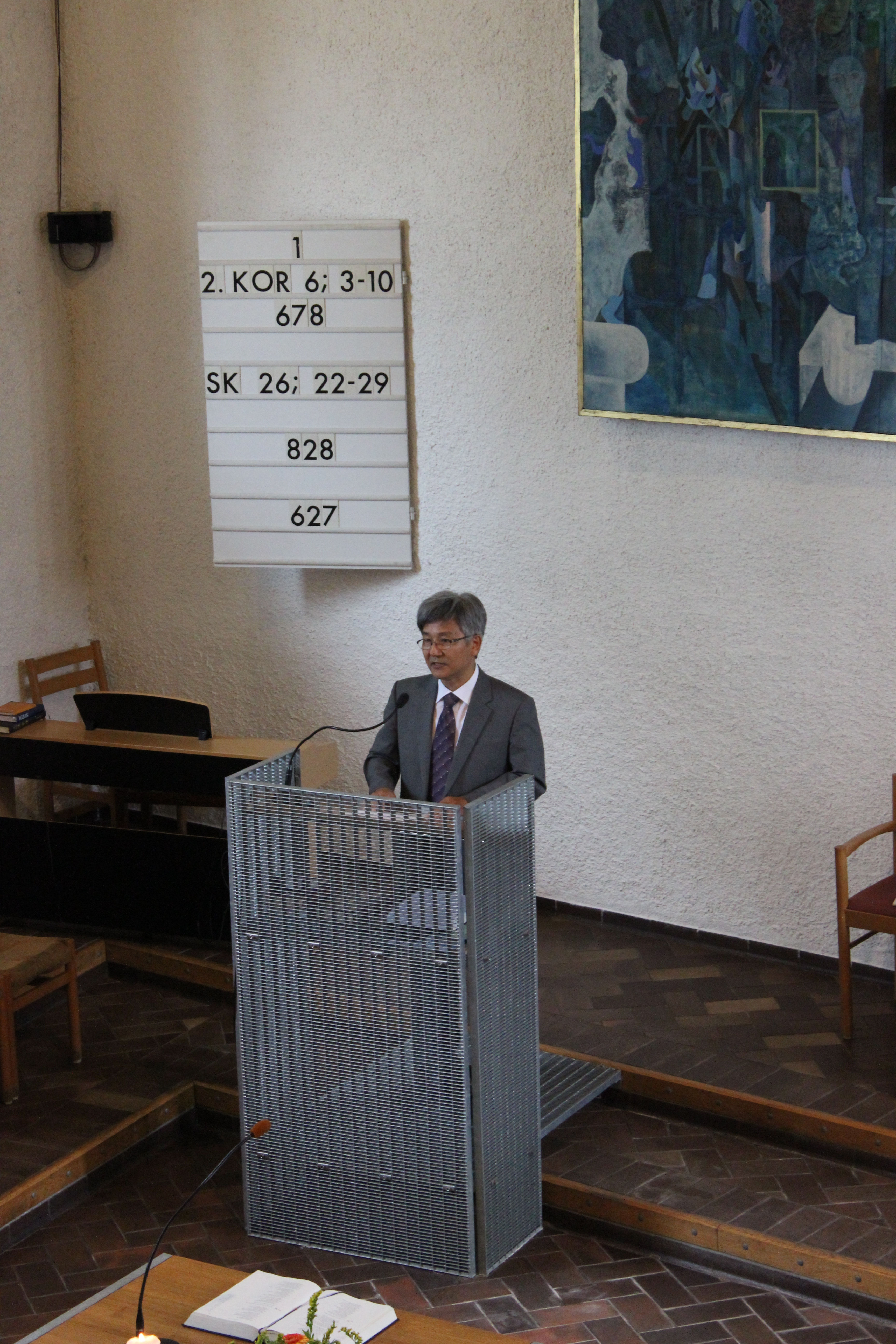 Současný farář korejské komunity ve sboru Jongsil Lee během odpolední bohoslužby.